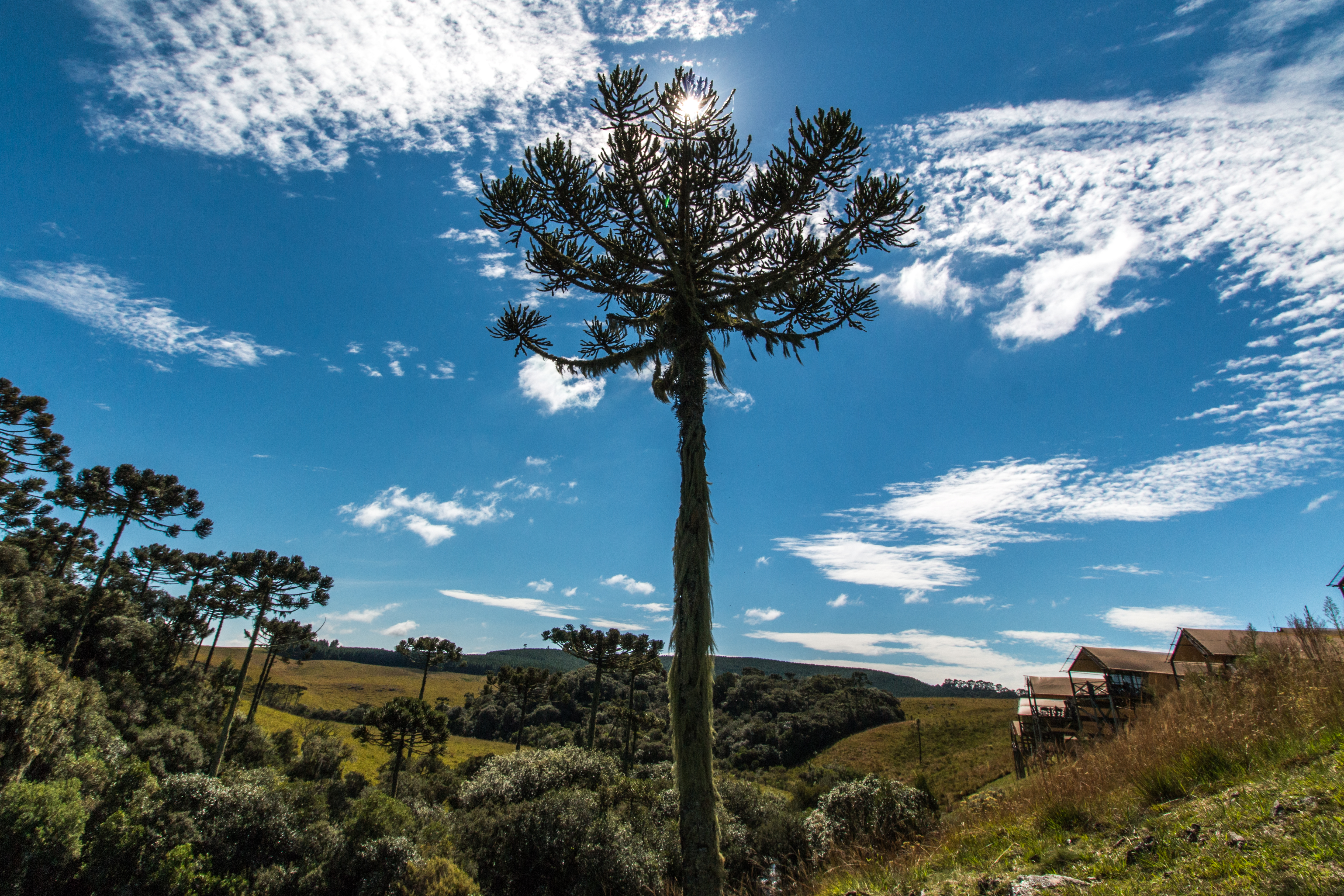 Um Exemplo de Araucária em fase adulta no Parque Nacional de Aparados da Serra